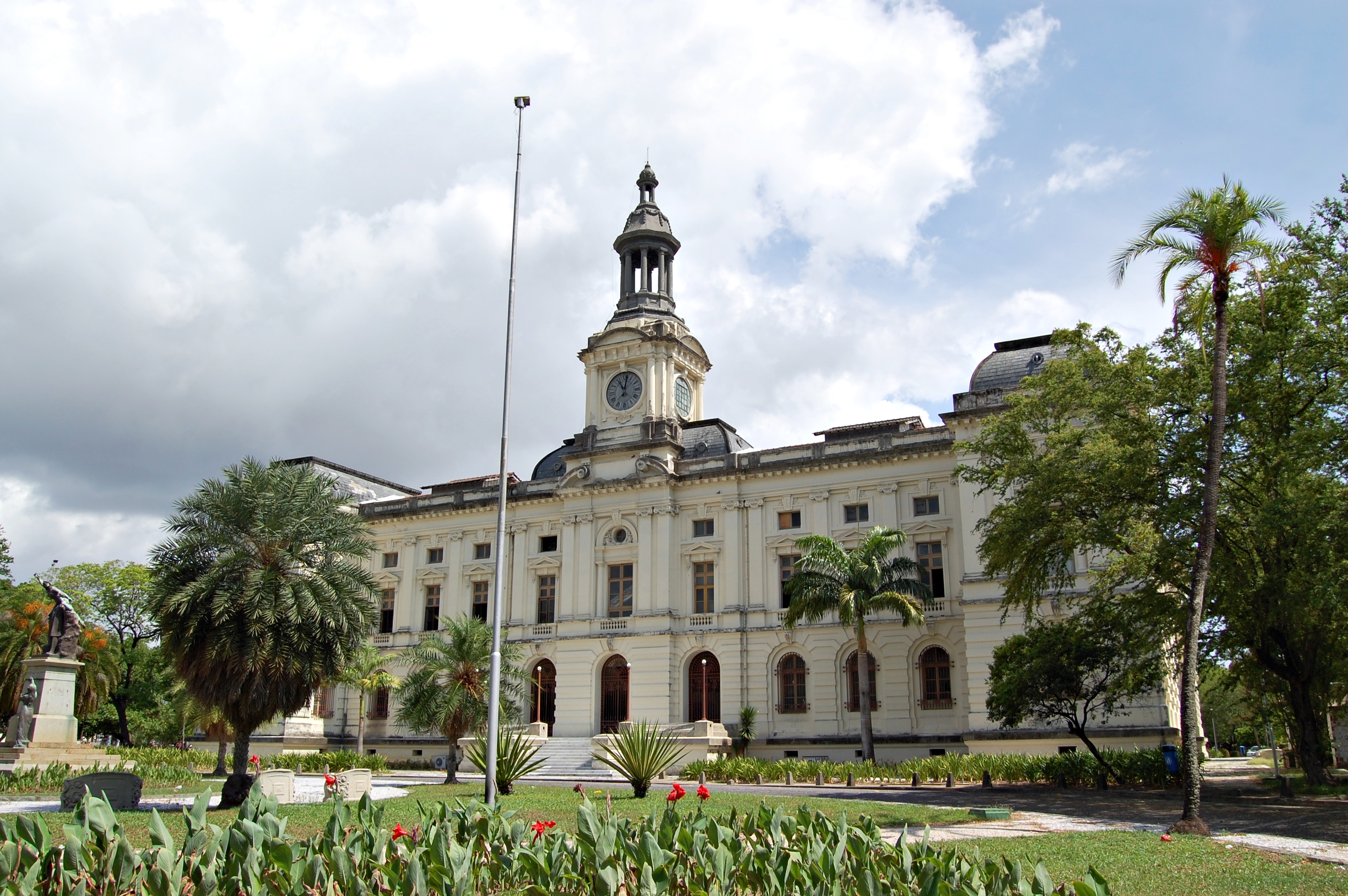 Fachada posterior do edifício da Faculdade de Direito da Universidade Federal de Pernambuco.